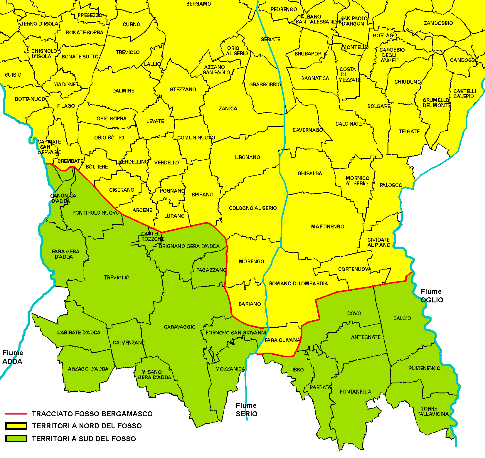 Tracciato del fosso bergamasco nella provincia di Bergamo